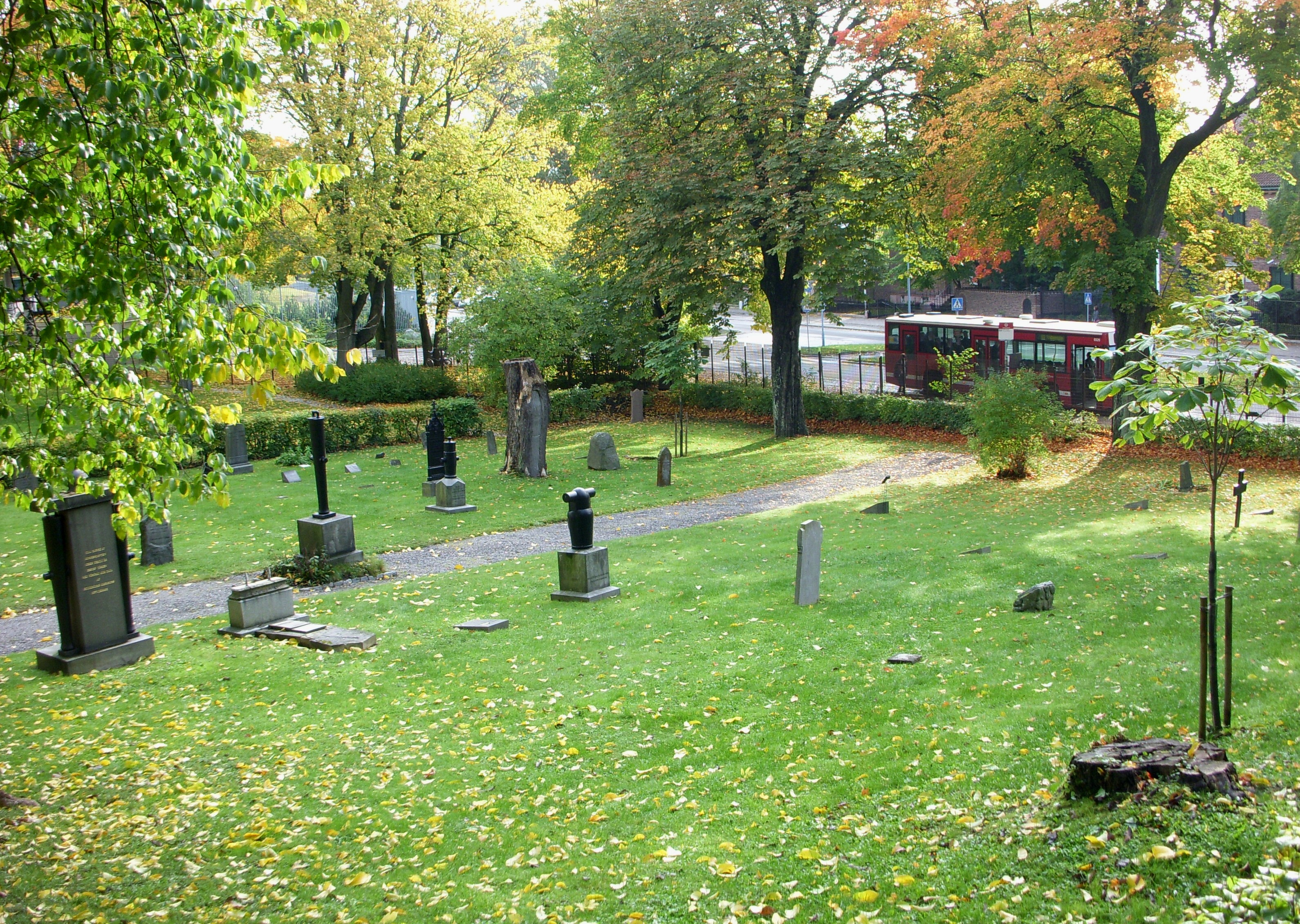 Artillerikyrkogården i Diplomatstaden i Stockholm